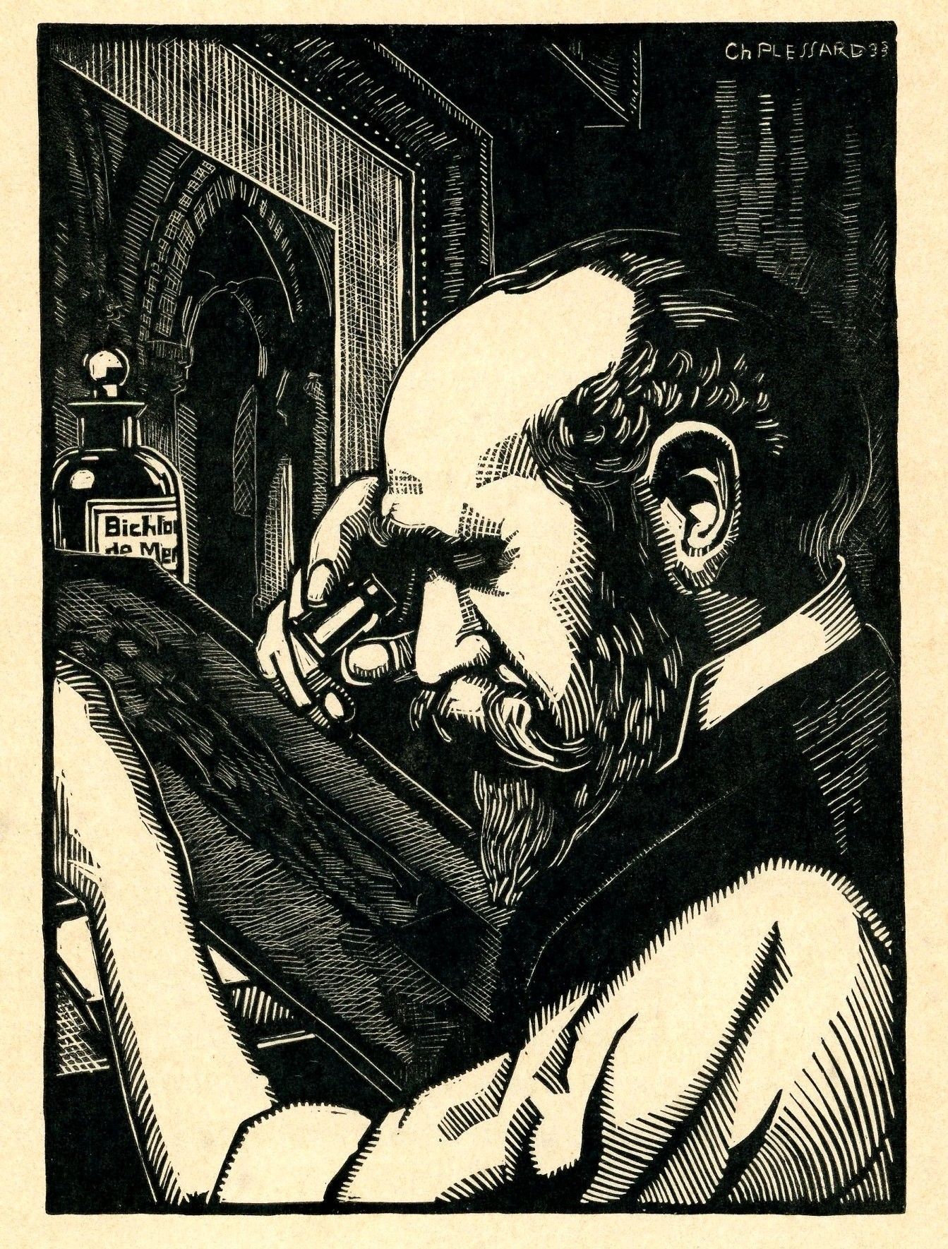 Charles Plessard - Charles Pinet à la pointe sèche (10,3 x 14,3 cm)